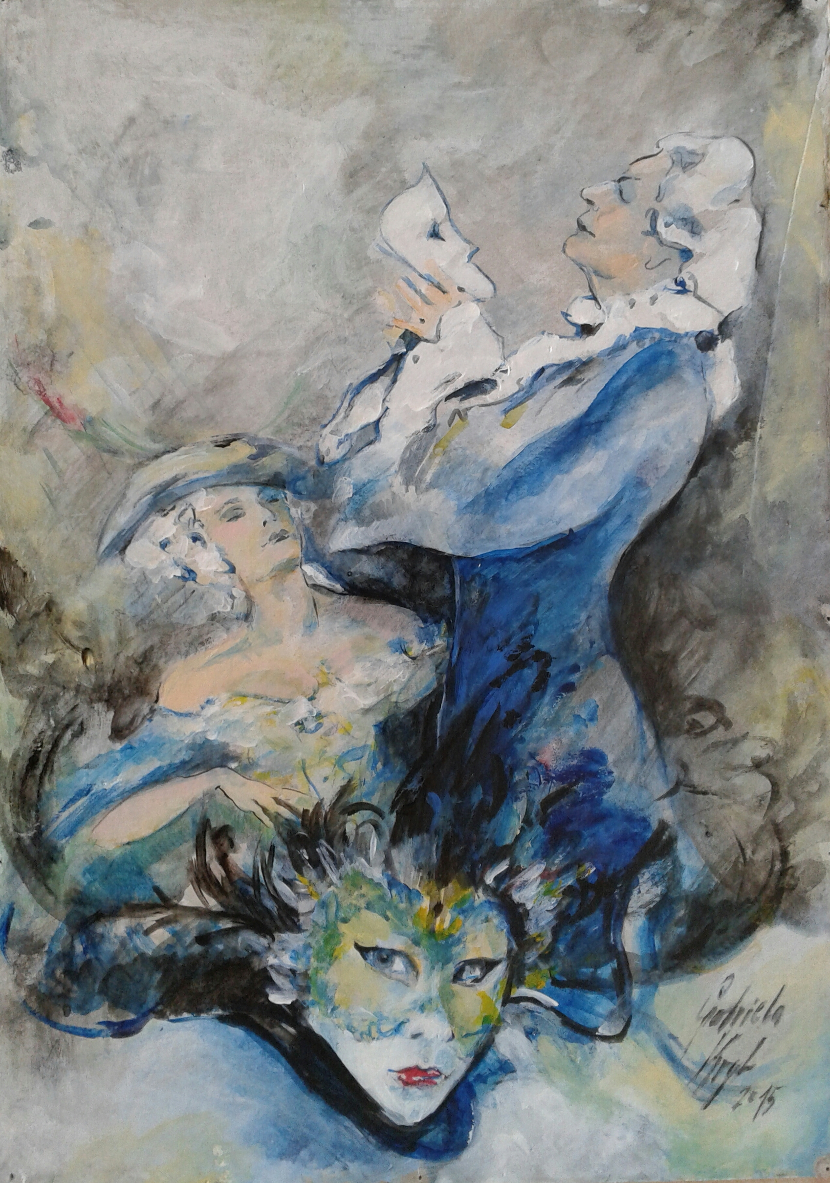 akryl, 49x35, 2015